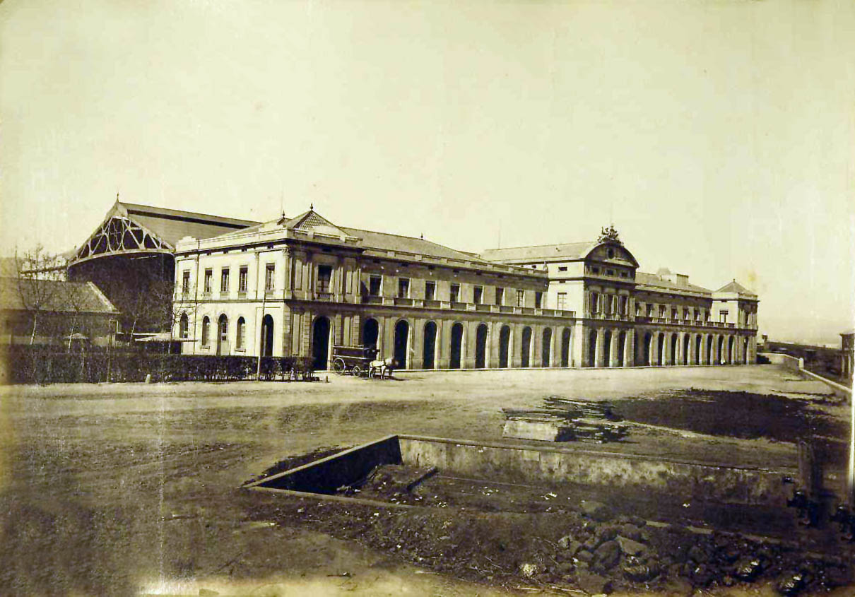 Estació del Nord (Barcelona) anys 1800. Gentilesa de l'arxiu de Ugo Manzoni